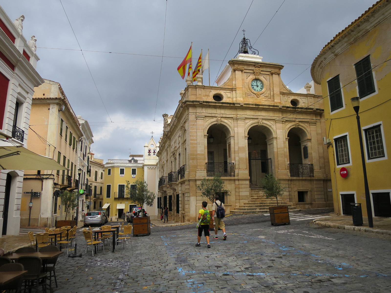 Mahon